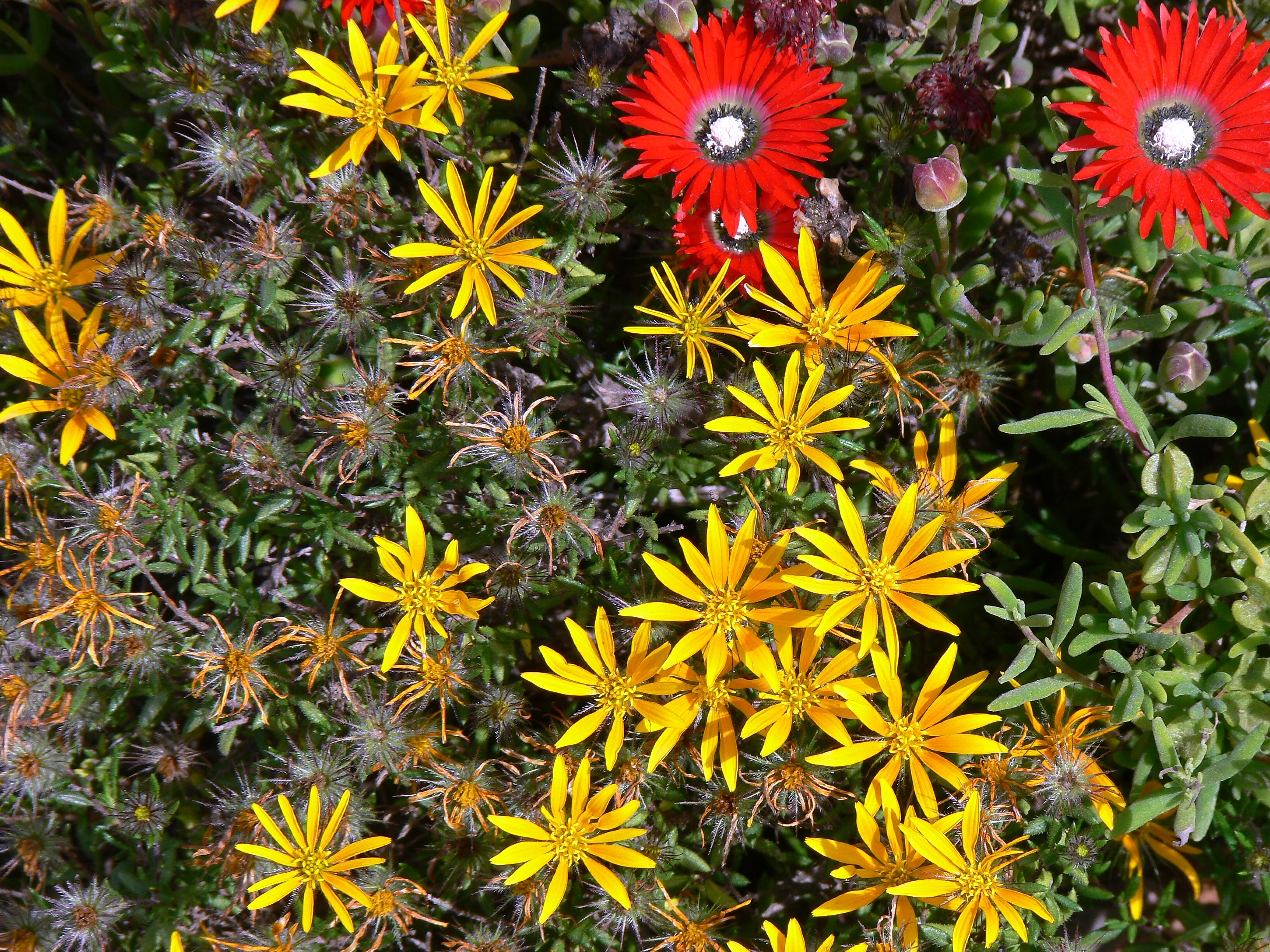 Hirpicium alienatum (Thunb.) Druce ; Haarbos, Kleihaarbossie, Meerjarige Gousblom